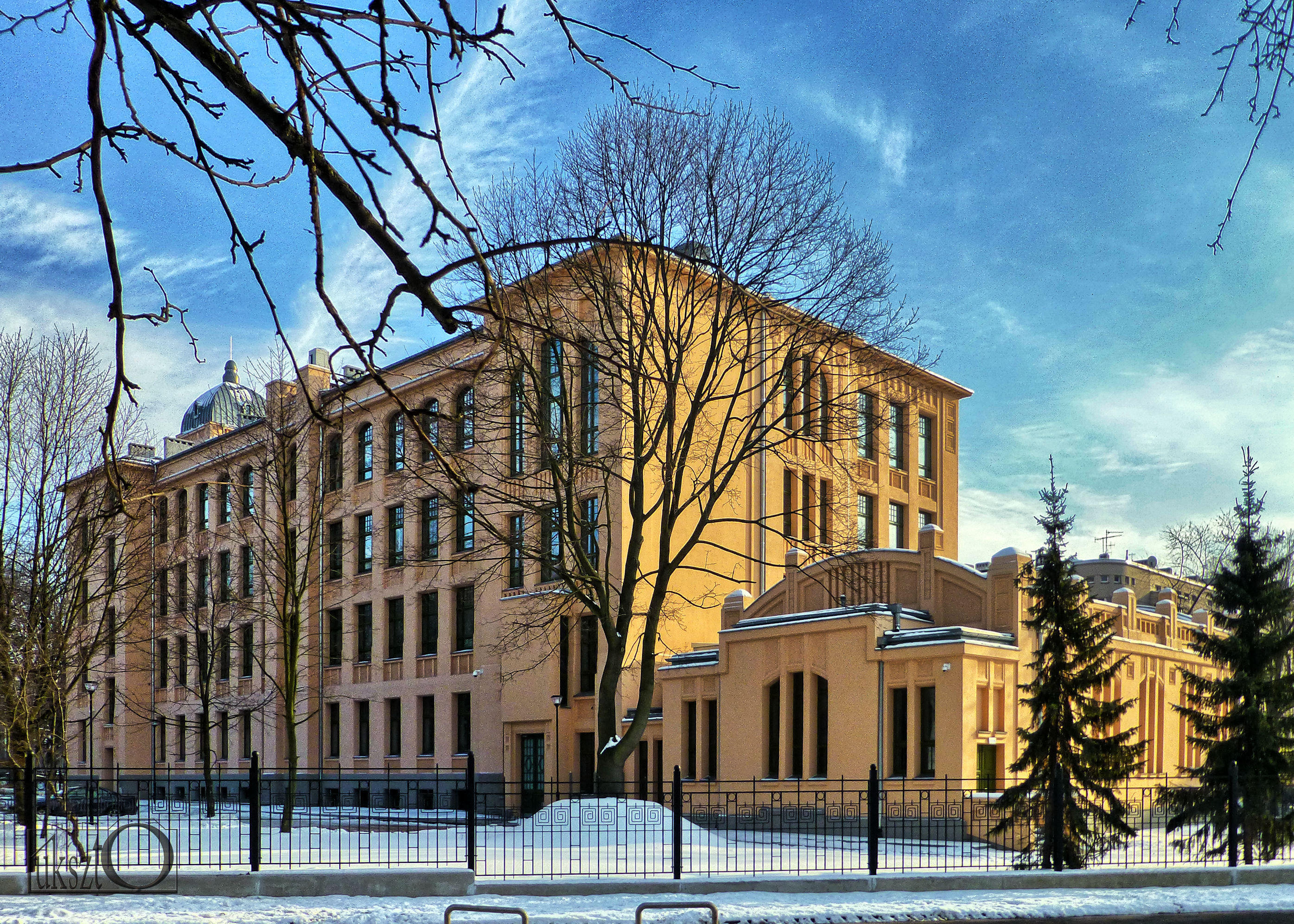 Łódź, Uniwersytet Łódzki Rektorat Uniwersytetu Łódzkiego - nowy